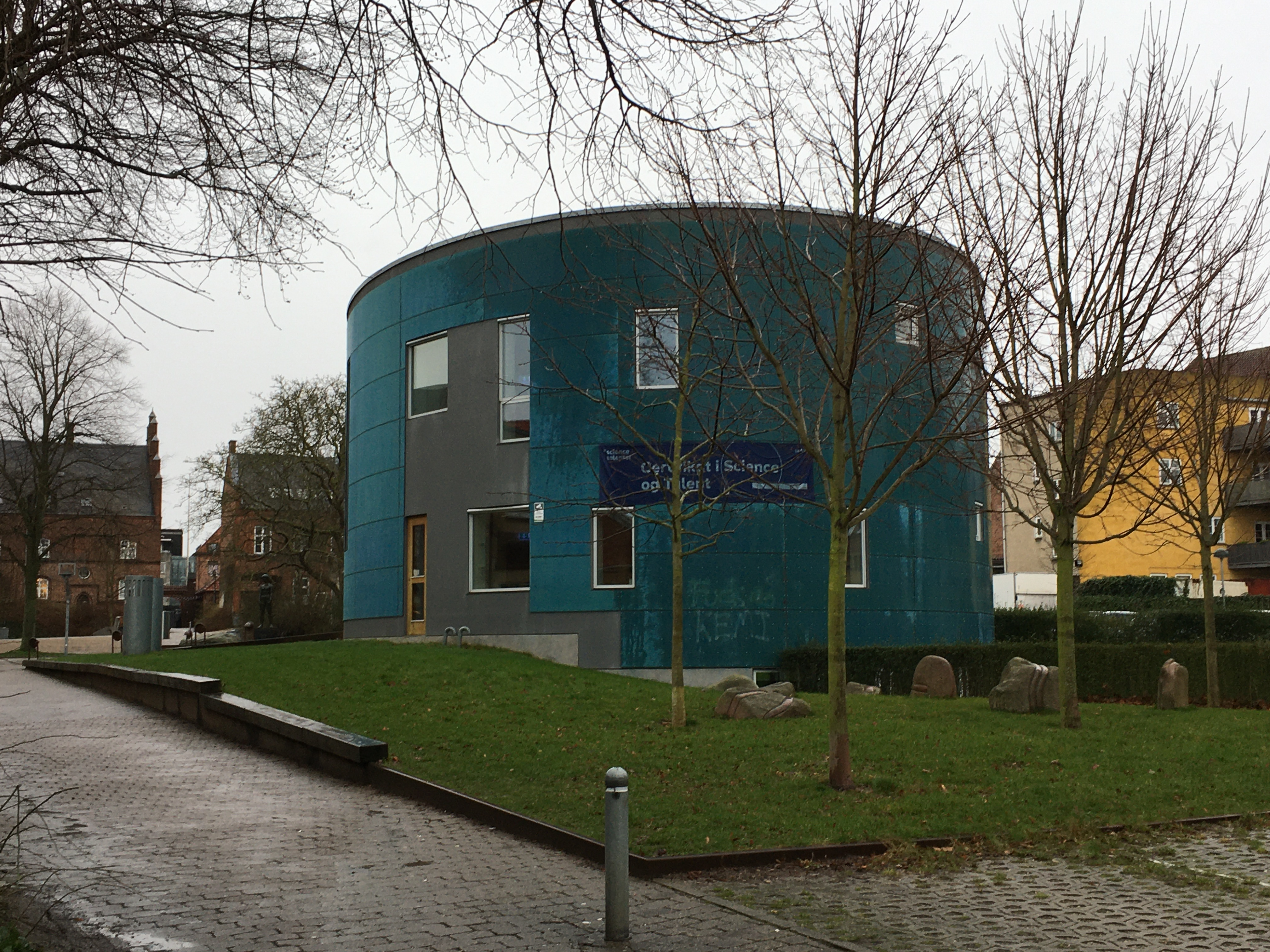 Roskilde Gymnasiums Sciencebygning